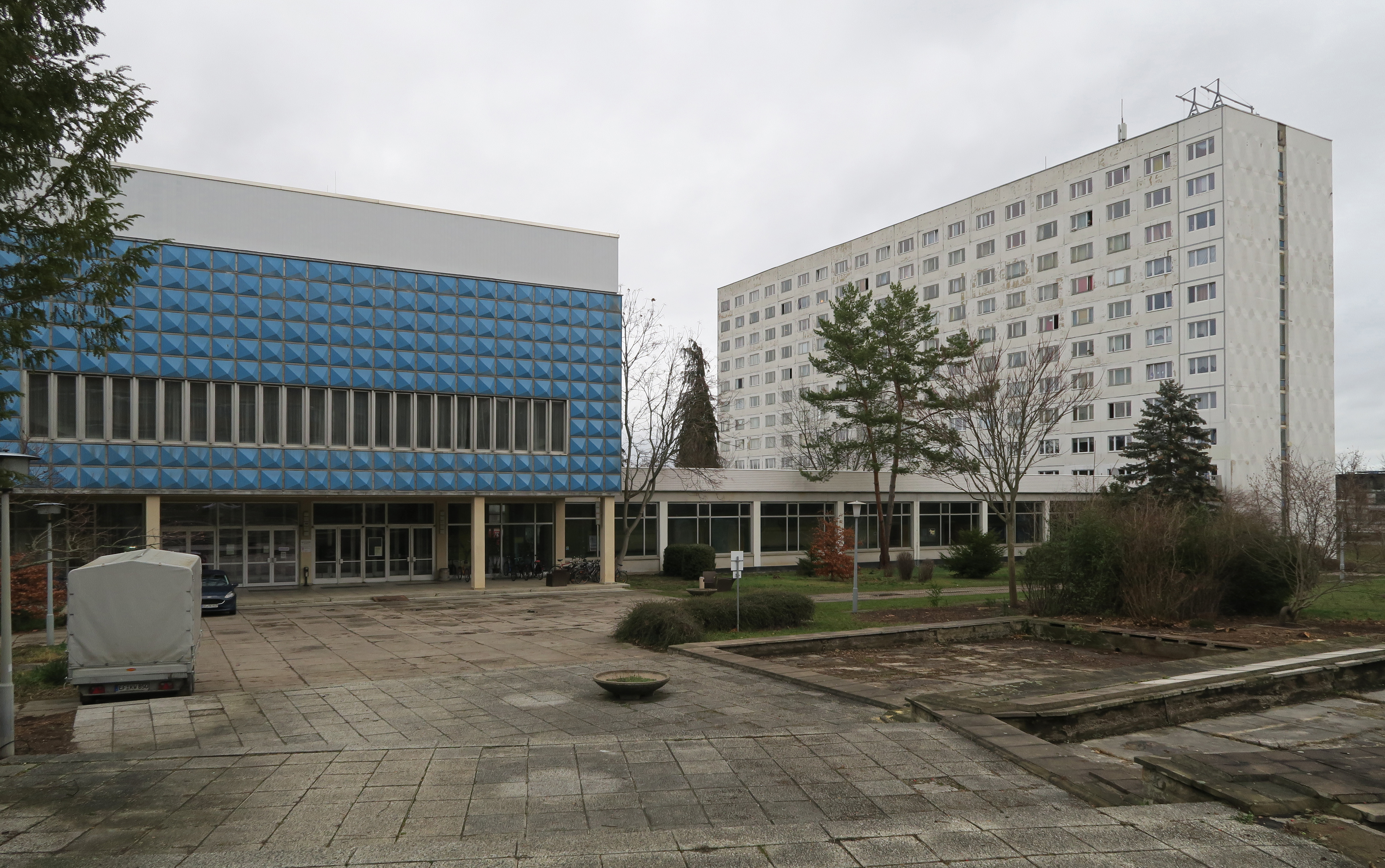 sehr gut erhaltener denkmalgeschützter Gebäudekomplex der früheren SED-Bezirksparteischule "Ernst Thälmann" Erfurt, Werner-Seelenbinder-Straße 14, Architekt Heinz Gebauer, erbaut 1969-1972, Spitzname "Rotes Kloster", Filmkulisse für DDR Geschichte.